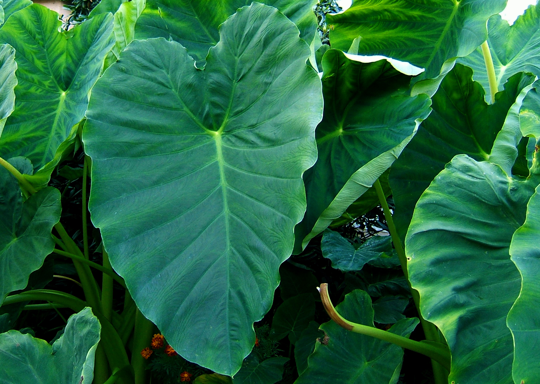 Colocasia esculenta, Taro